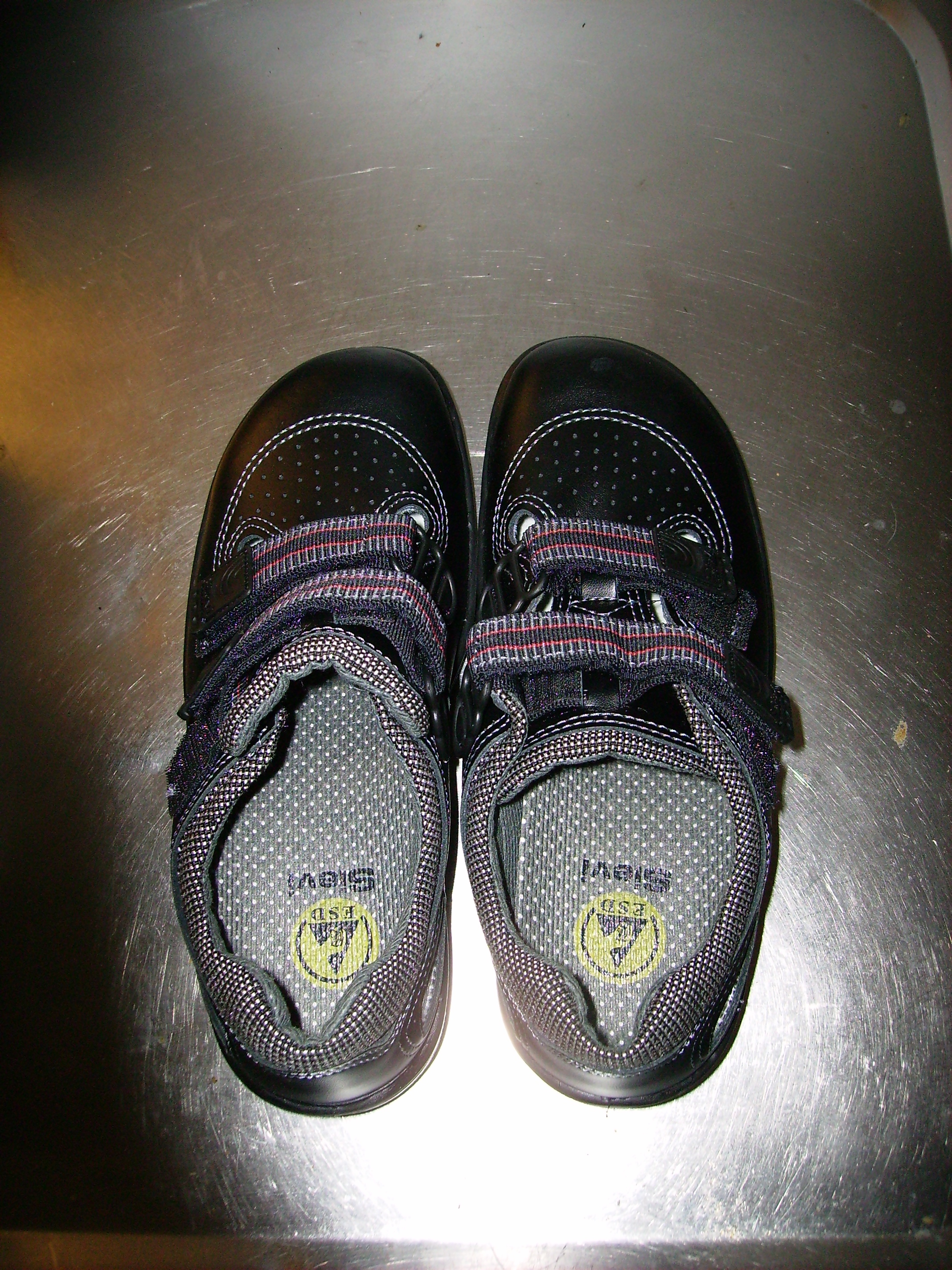 Arbetsskor